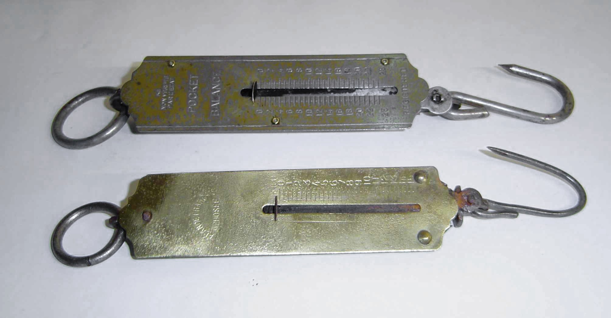 Photo personnelle de ma collection